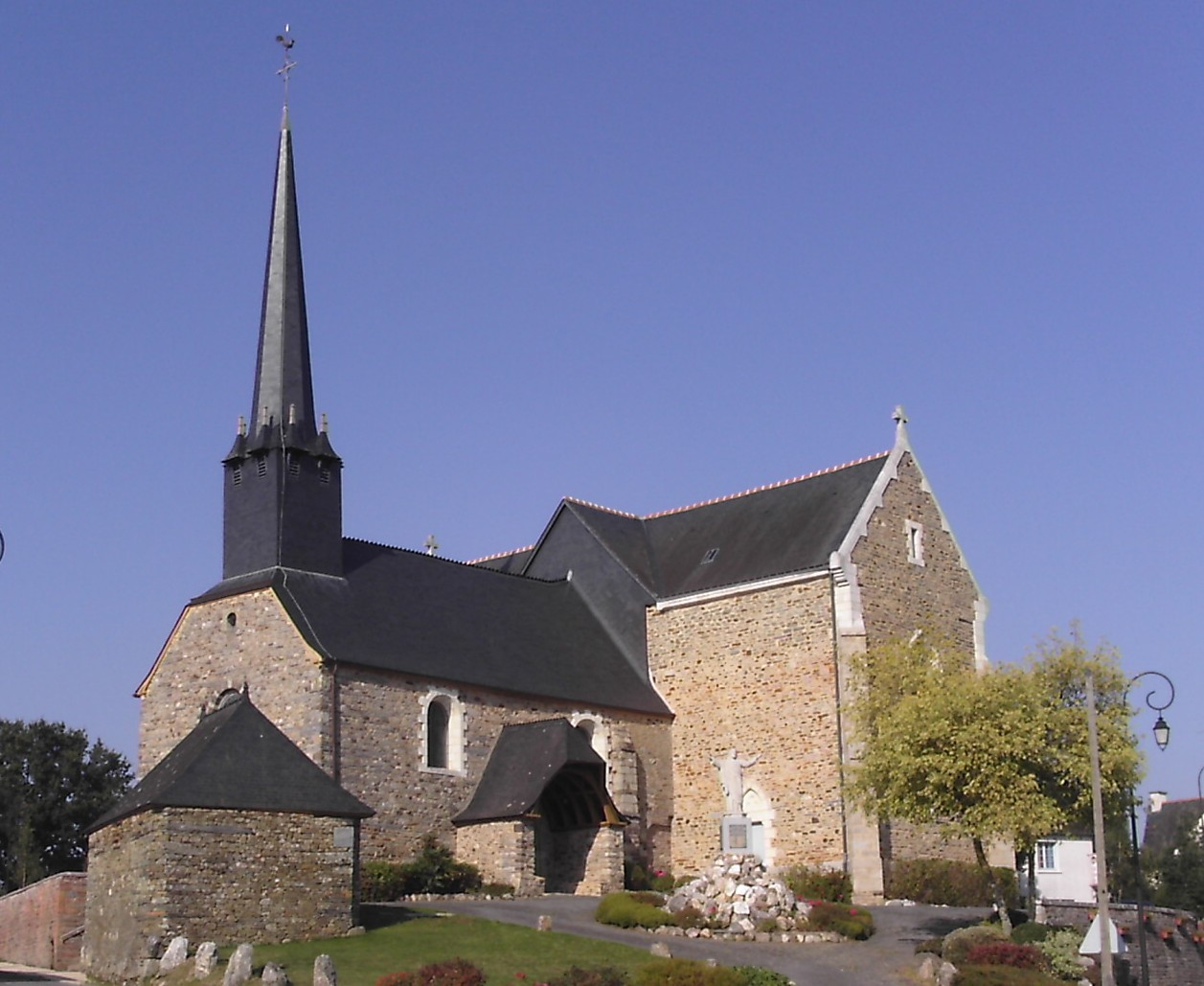 Église Saint Michel de Bruc-sur-Aff (Ille-et-Vilaine)